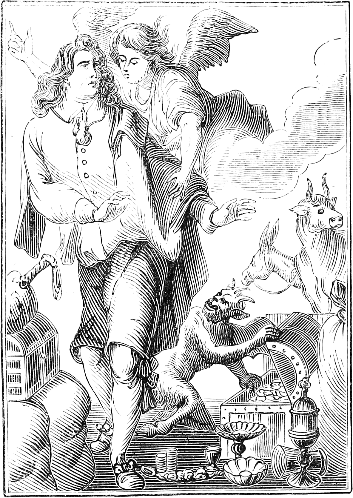 Une illustration pour l’article Démons dans le Dictionnaire infernal par Collin de Plancy.